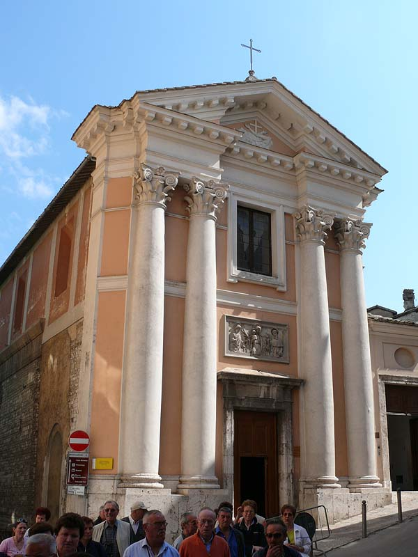 Chiesa di Sant'Ansano, facade